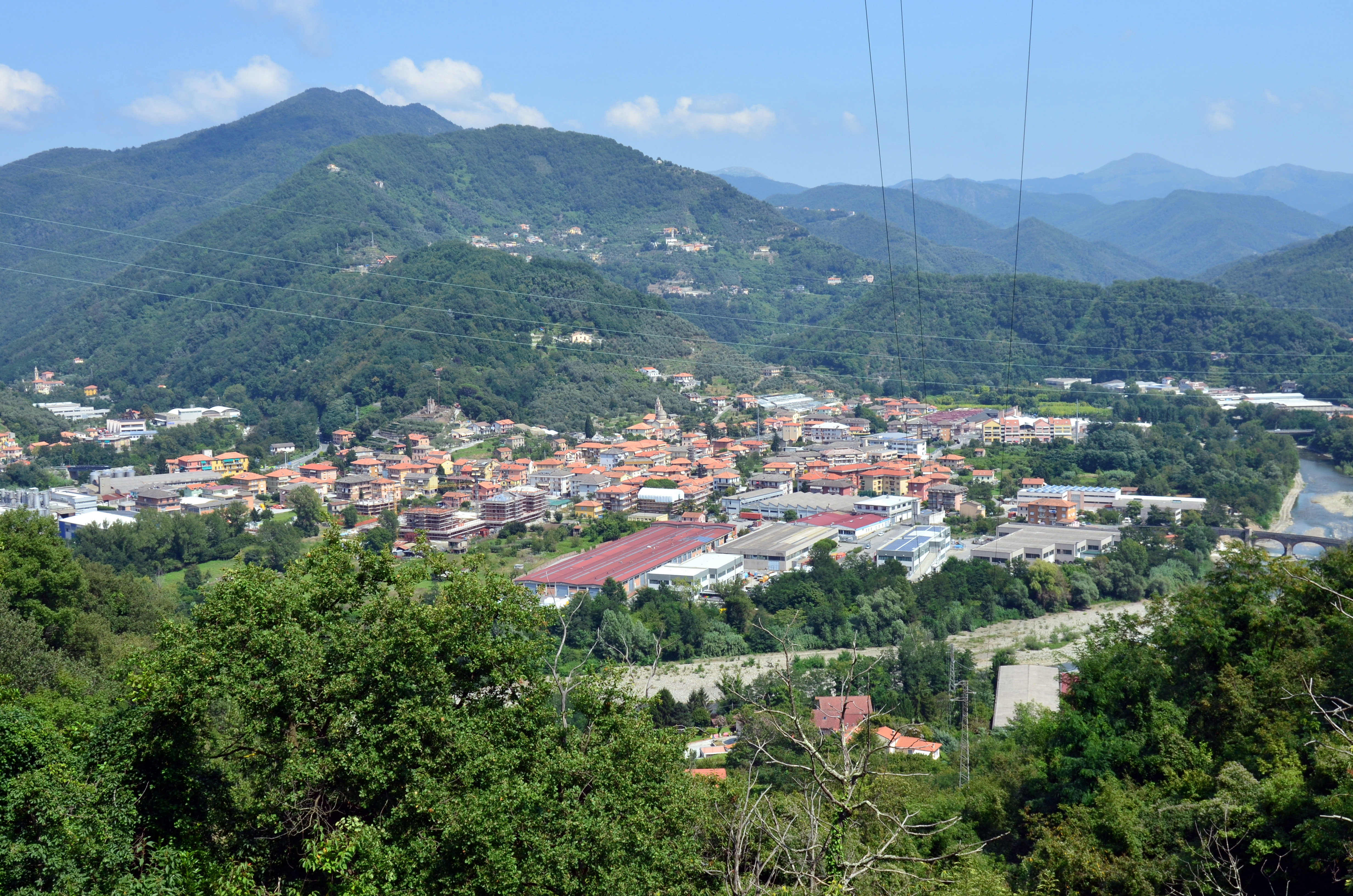 Panorama di Carasco dalla strada per Leivi, Liguria, Italia